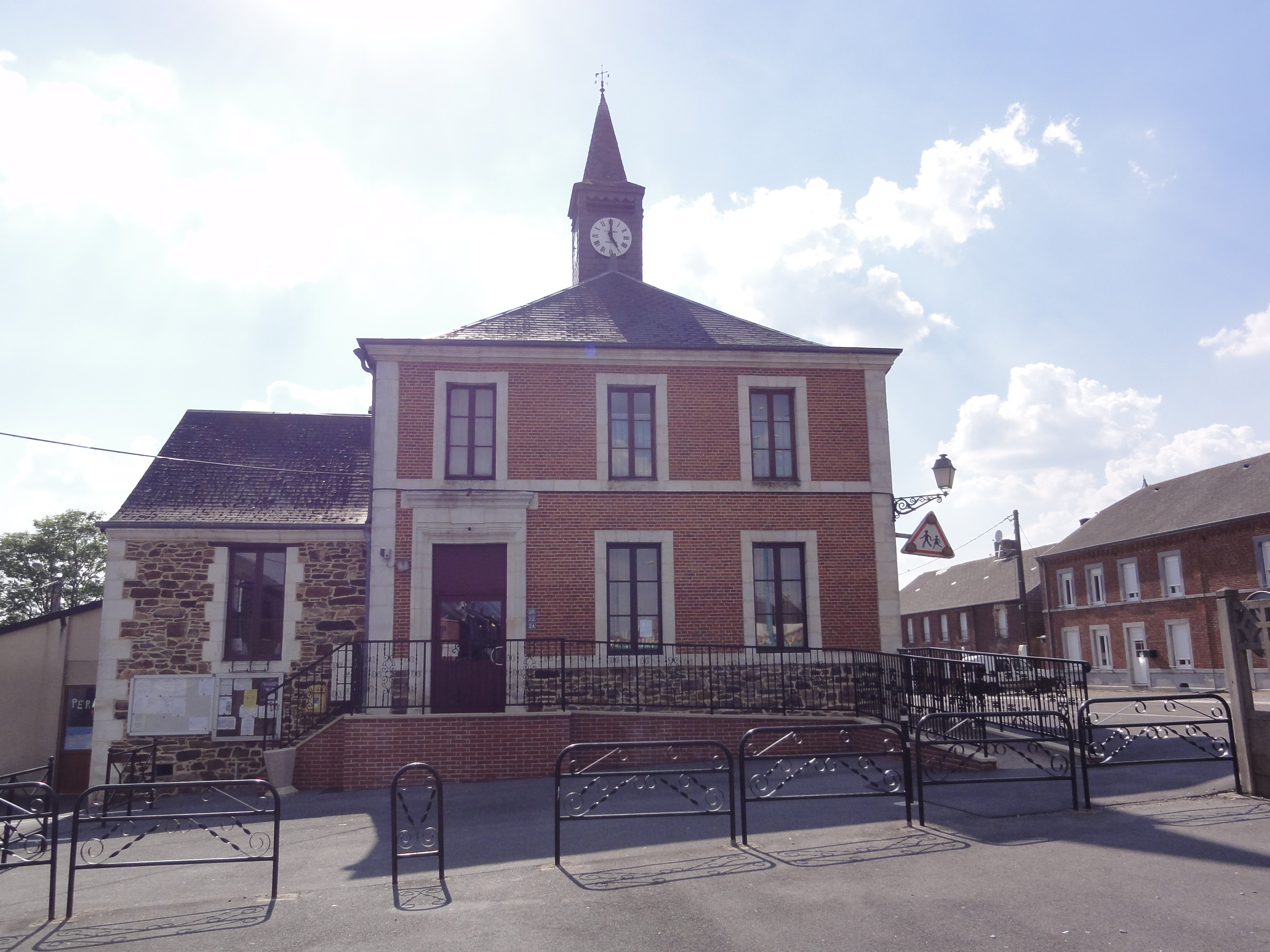 Éteignières (Ardennes) École